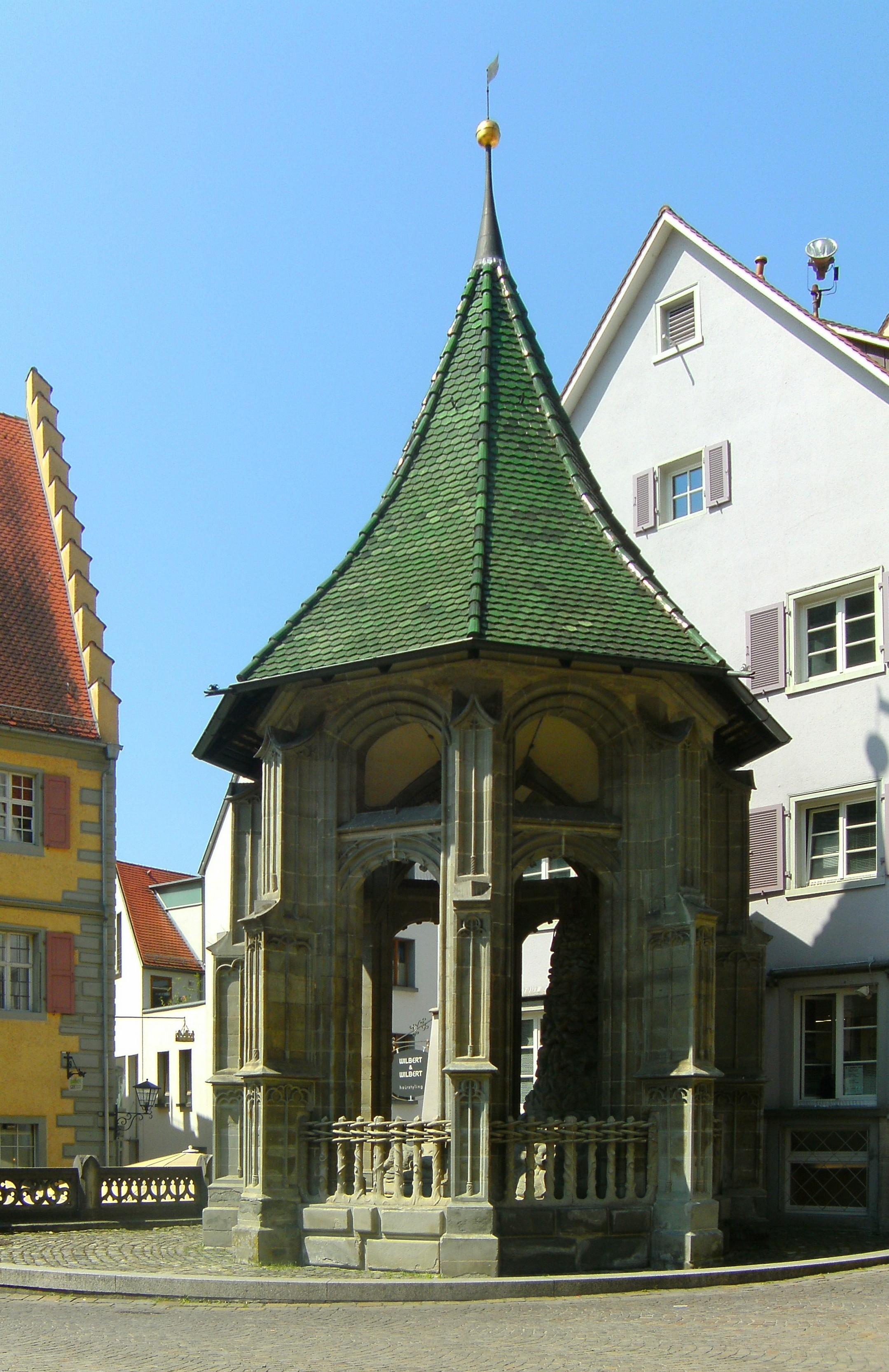 Ölberg in Überlingen